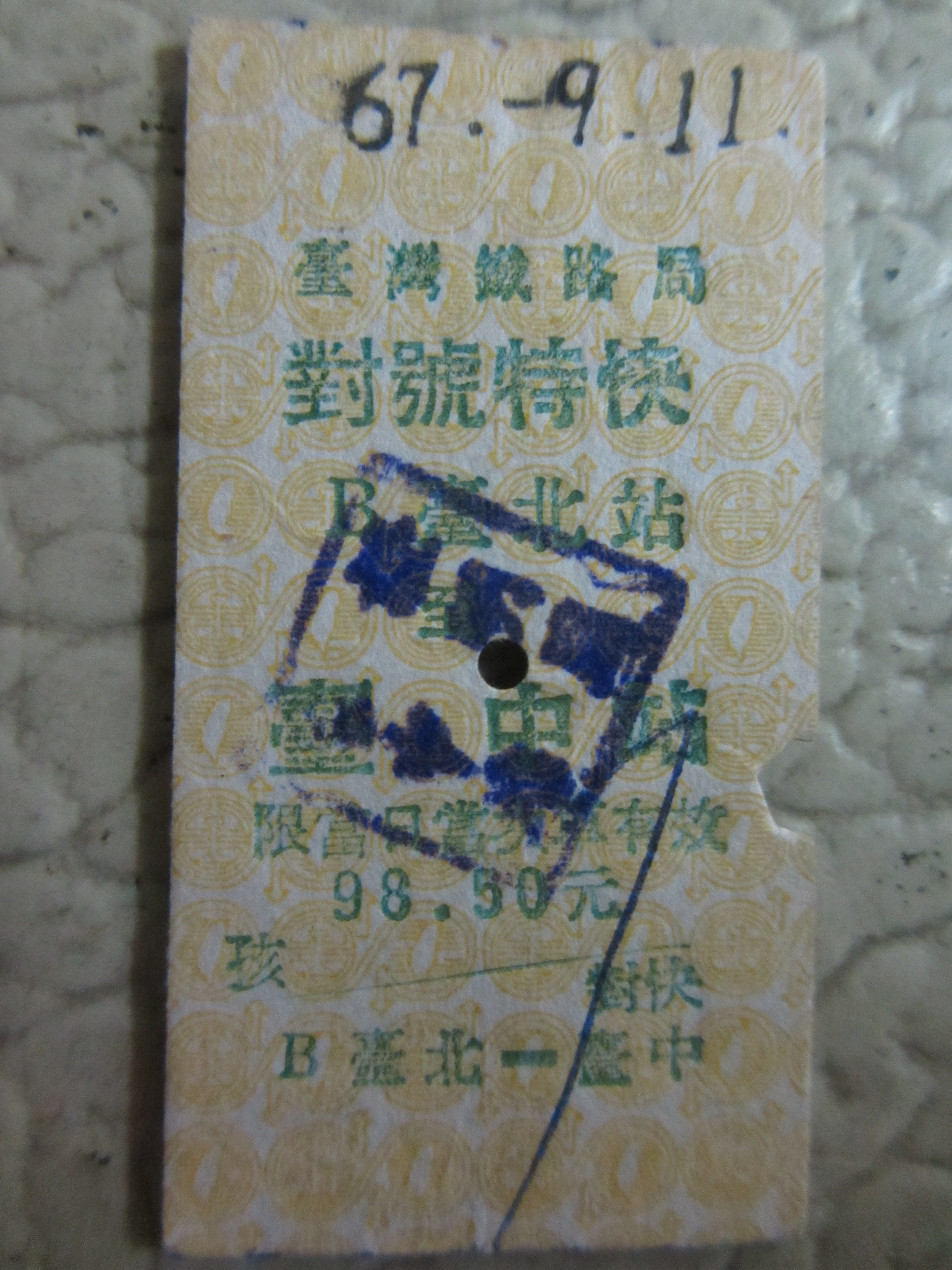 台鐵對號特快名片式車票 台北往台中